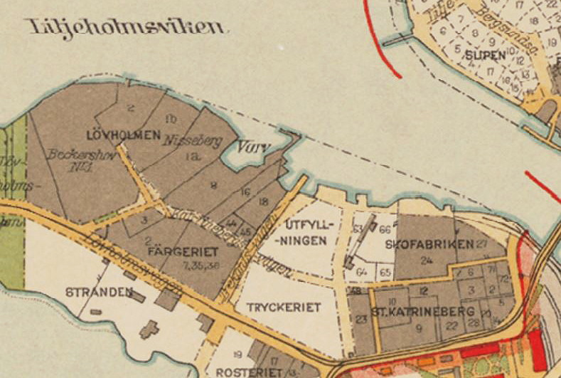 Del av Stockholmskarta visande Lövholmen och Löfholmsvarvet